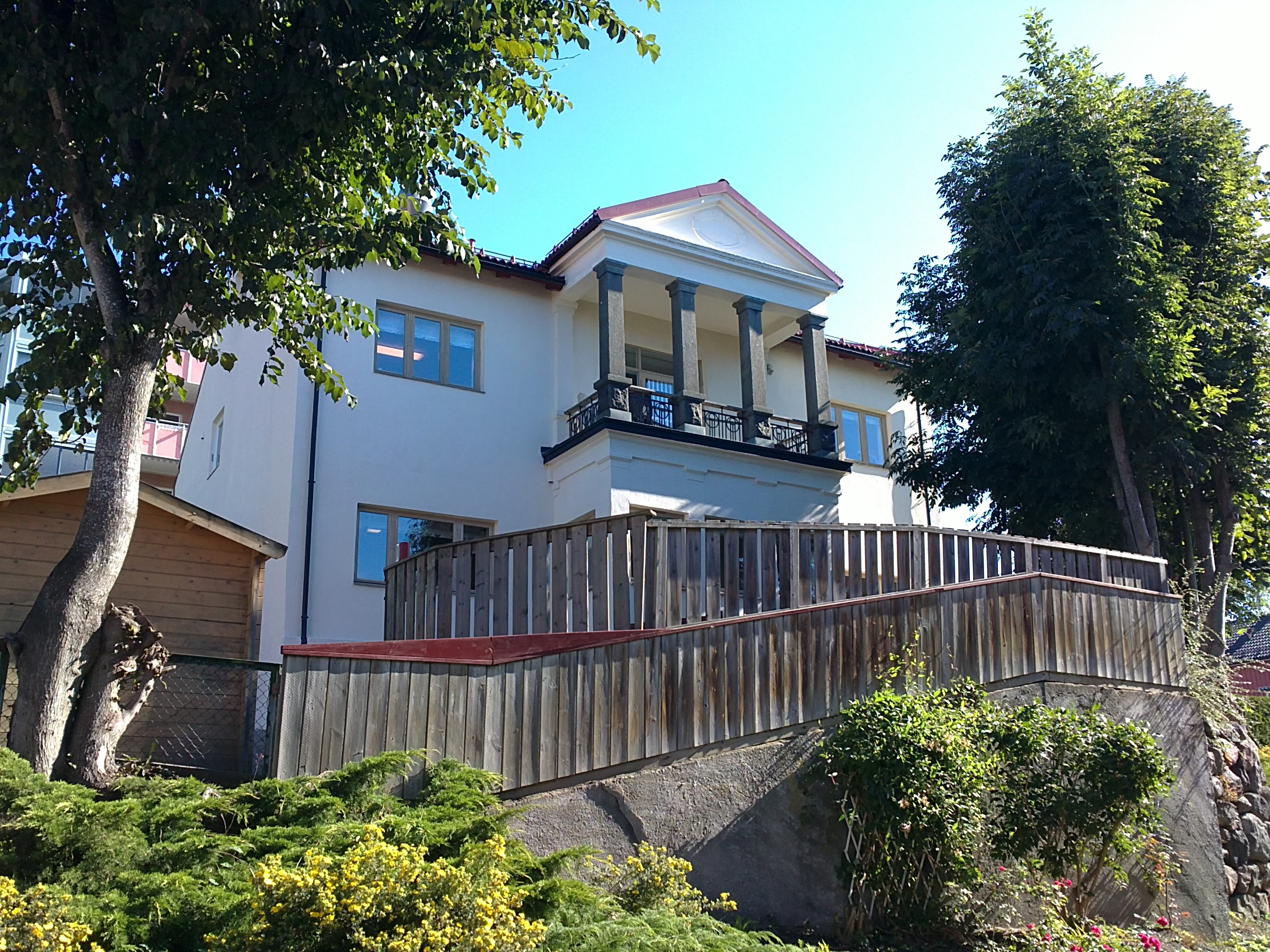 Bilde av Jegersborg barnehage, Knut Hamsuns hjem 1917-1918